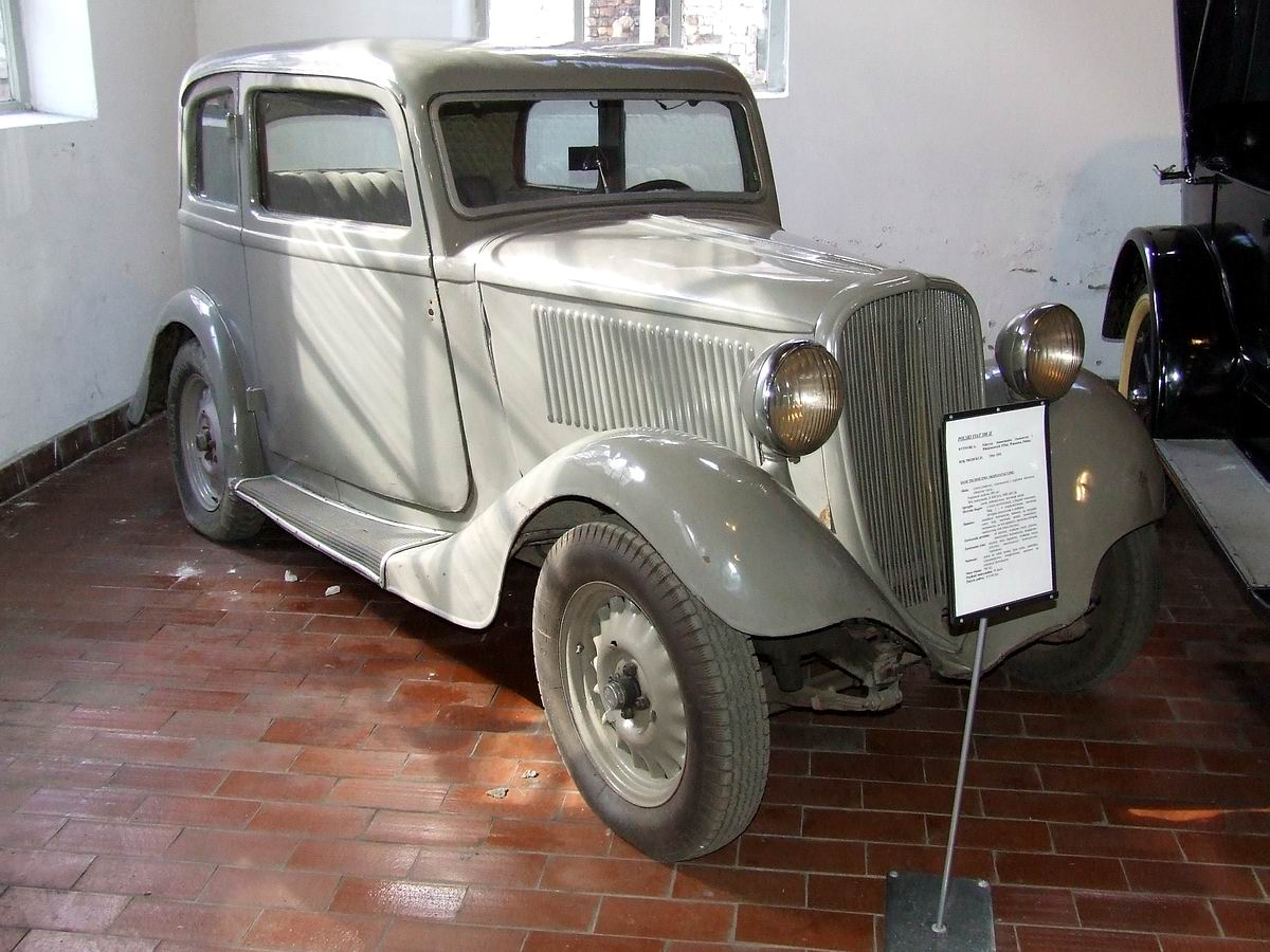 Polski Fiat 505 II made in PZInż, 1934-1935